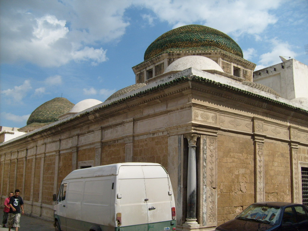 Façade occidentale du mausolée du Tourbet El Bey coiffé de certaines de ses coupoles (Tunis)